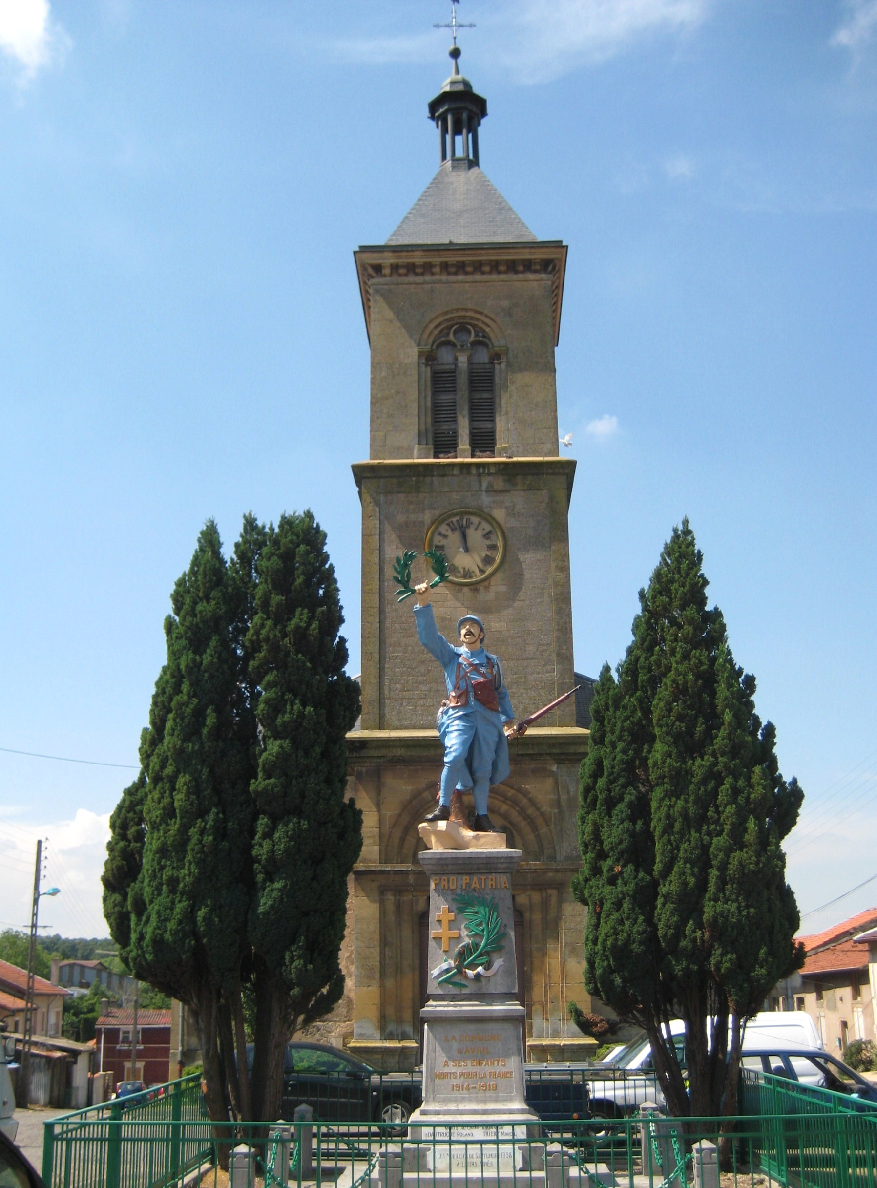 Description Église paroissiale de L'Assomption d'Avril Date 26 June 2009 Source mon appareil photo Author Aimelaime Église paroissiale de L'Assomption d'Avril